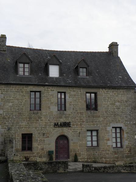 Mairie de Saint-Hilaire-des-Landes (35)